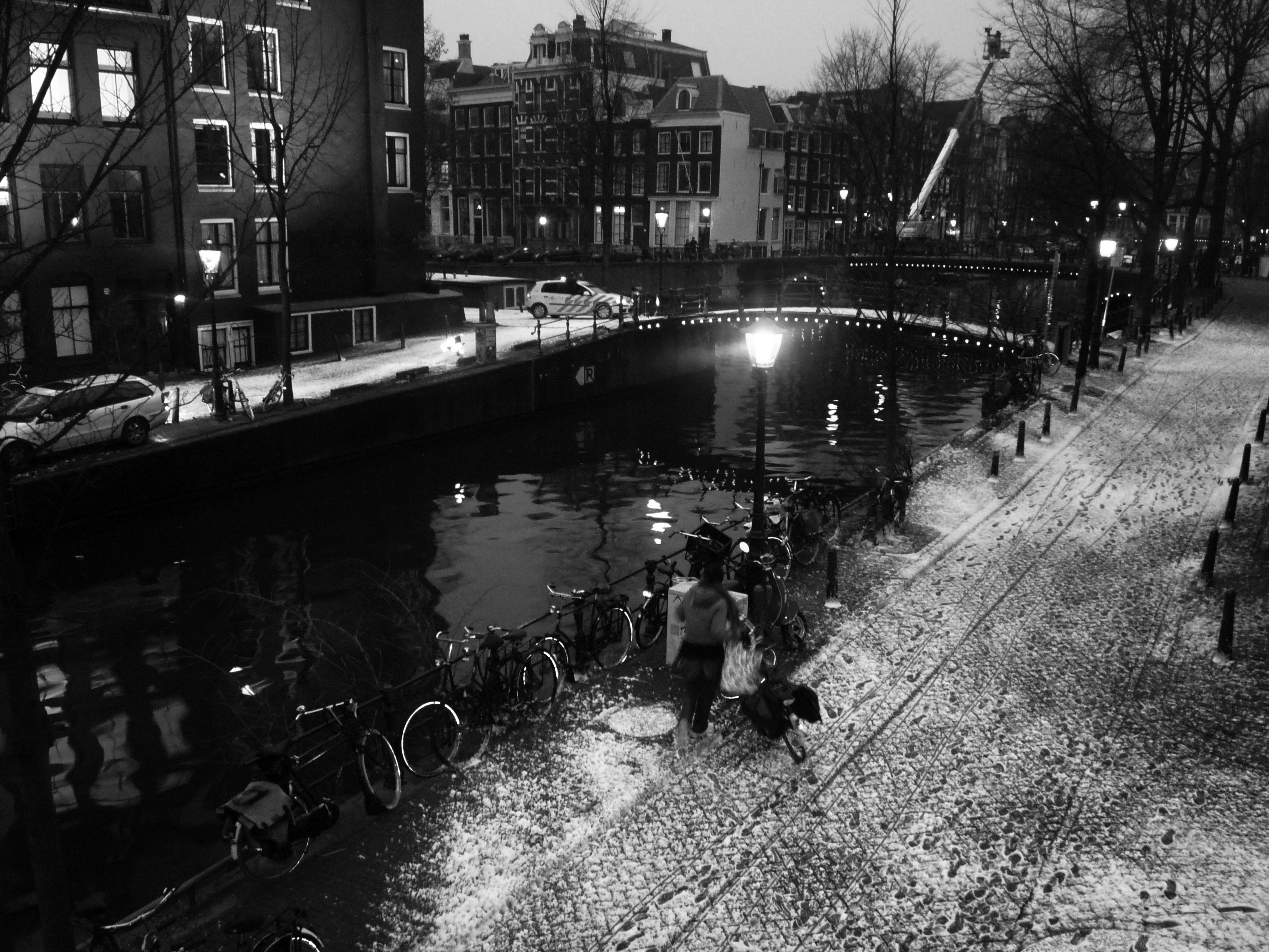 Hoek Brouwersgracht / Herengracht. Het hoekpand bij de politieauto, zijaanzicht van Herengracht 1 This is an image of rijksmonument number 1510 Aan de overkant, het hoekpand met rode dak, Herengracht 2 This is an image of rijksmonument number 1693 Links van hoekpand met rode dak, Herengracht 4 This is an image of rijksmonument number 1694 Achter cq rechts van hoekpand met rode dak, Brouwersgracht 29 De scene die hier wordt opgenomen is te zien in de trailer van deze film; de agent die vanuit de auto schiet.